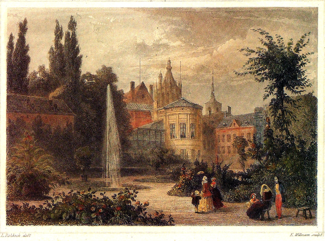 Ansicht des Elisengartens mit der Wohnung des Regierungspräsidenten, dem Münsterchor und dem Turm von St. Foillian im Hintergrunde